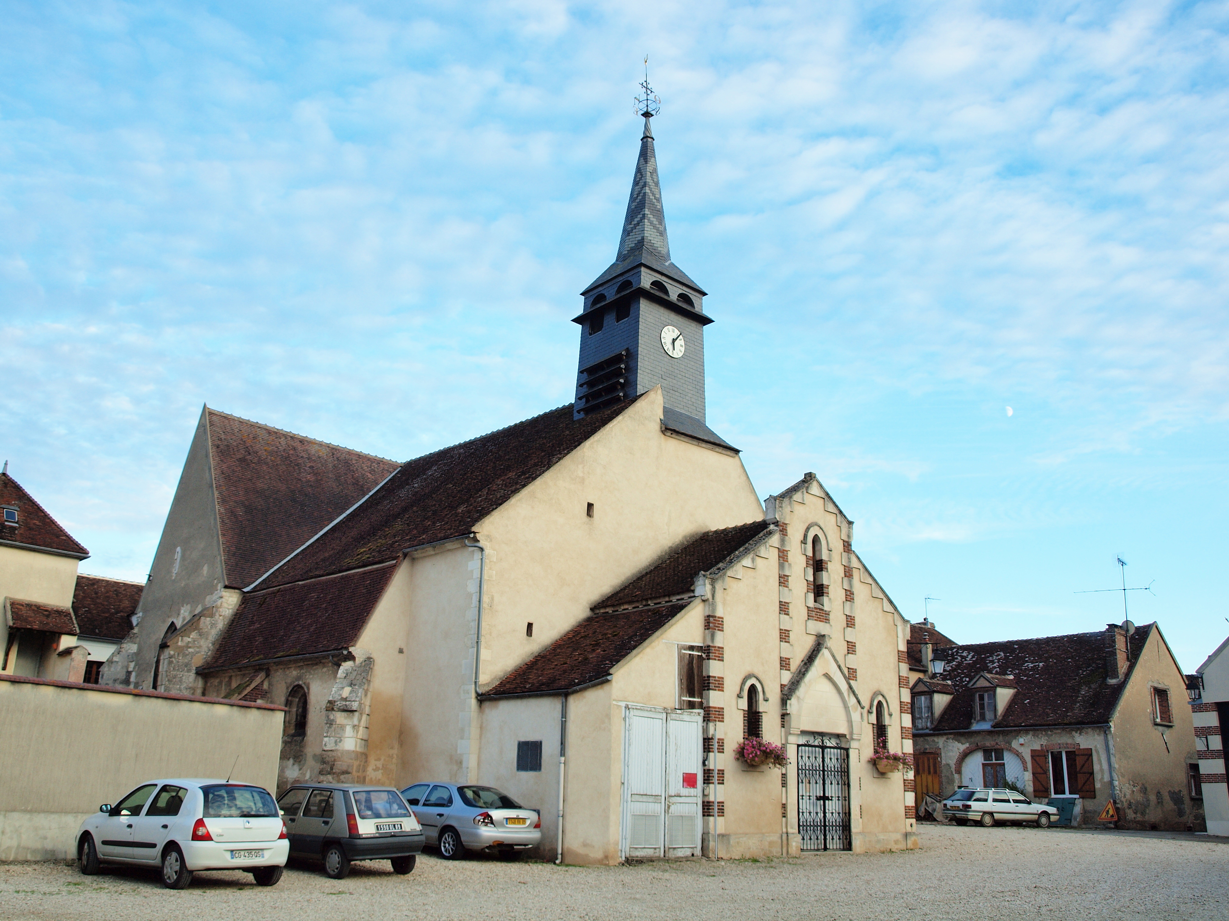 Bassou (Yonne, France)